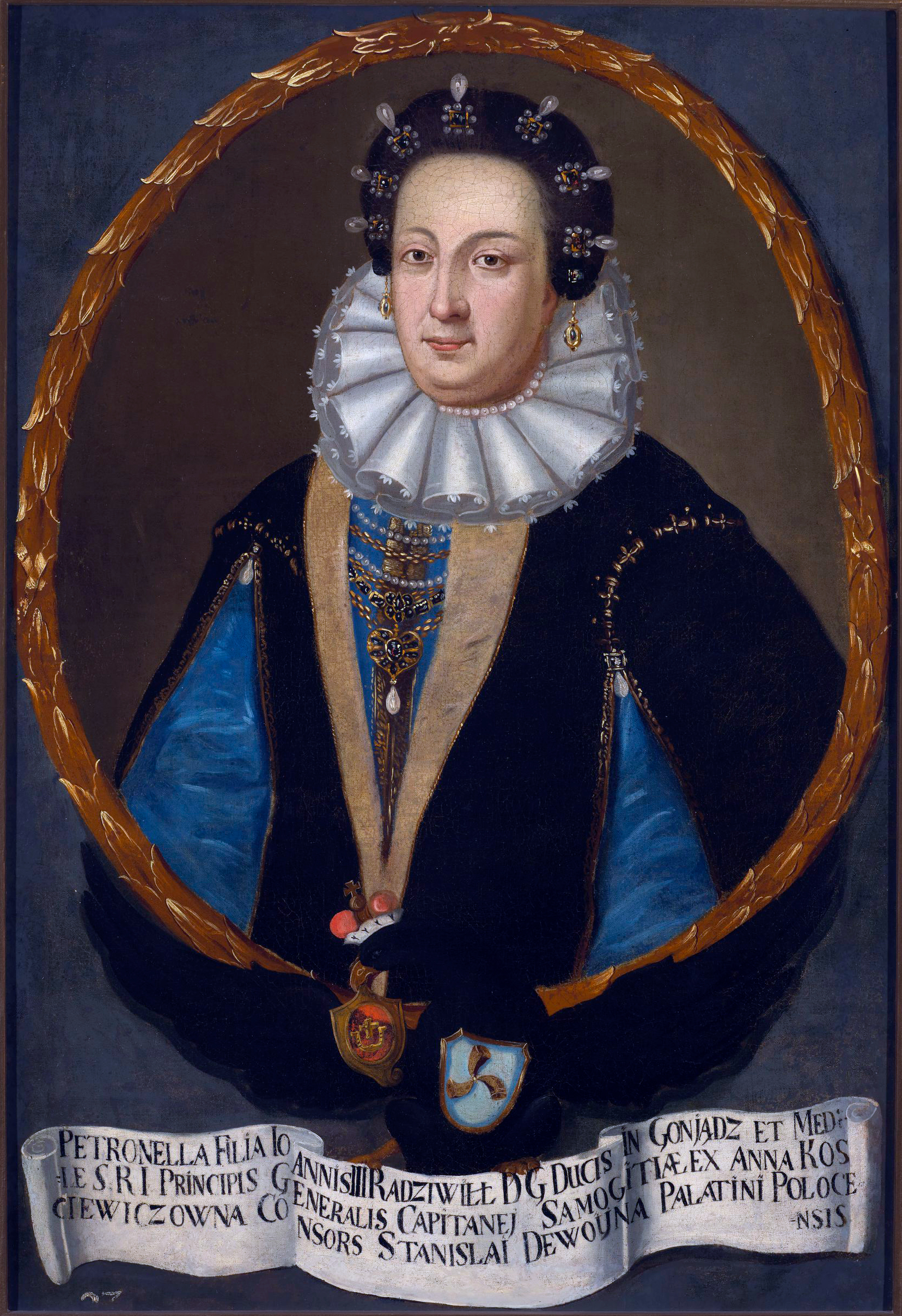 Беларуская (тарашкевіца): Партрэт Пэтранэлі Давойны (Petranela Davojna) з князёў Радзівілаў (Radzivił)